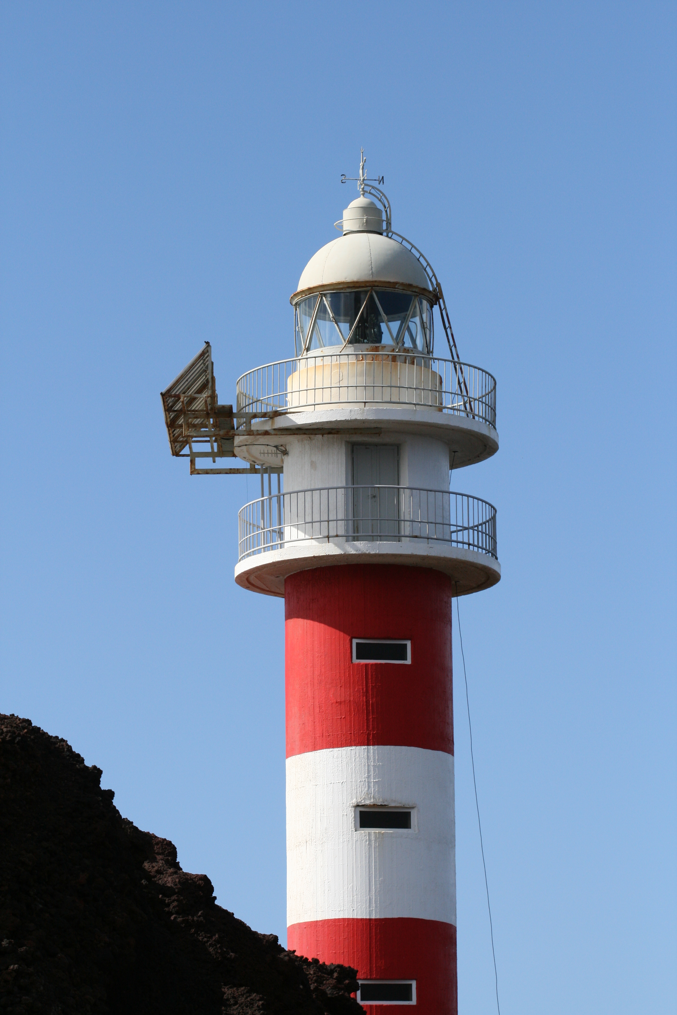 Tenerife, Islas Canarias